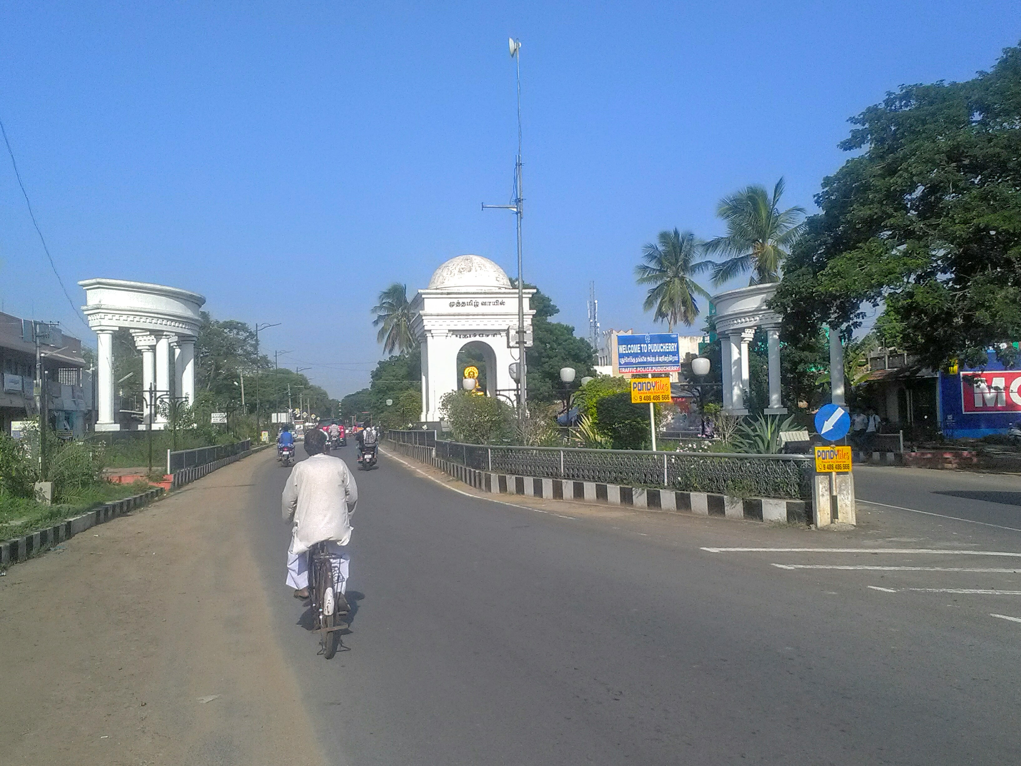 புதுச்சேரி மாநிலத்தில் உள்ள மதகடிப்பட்டு என்னும் ஊரின் நுழைவாயில்